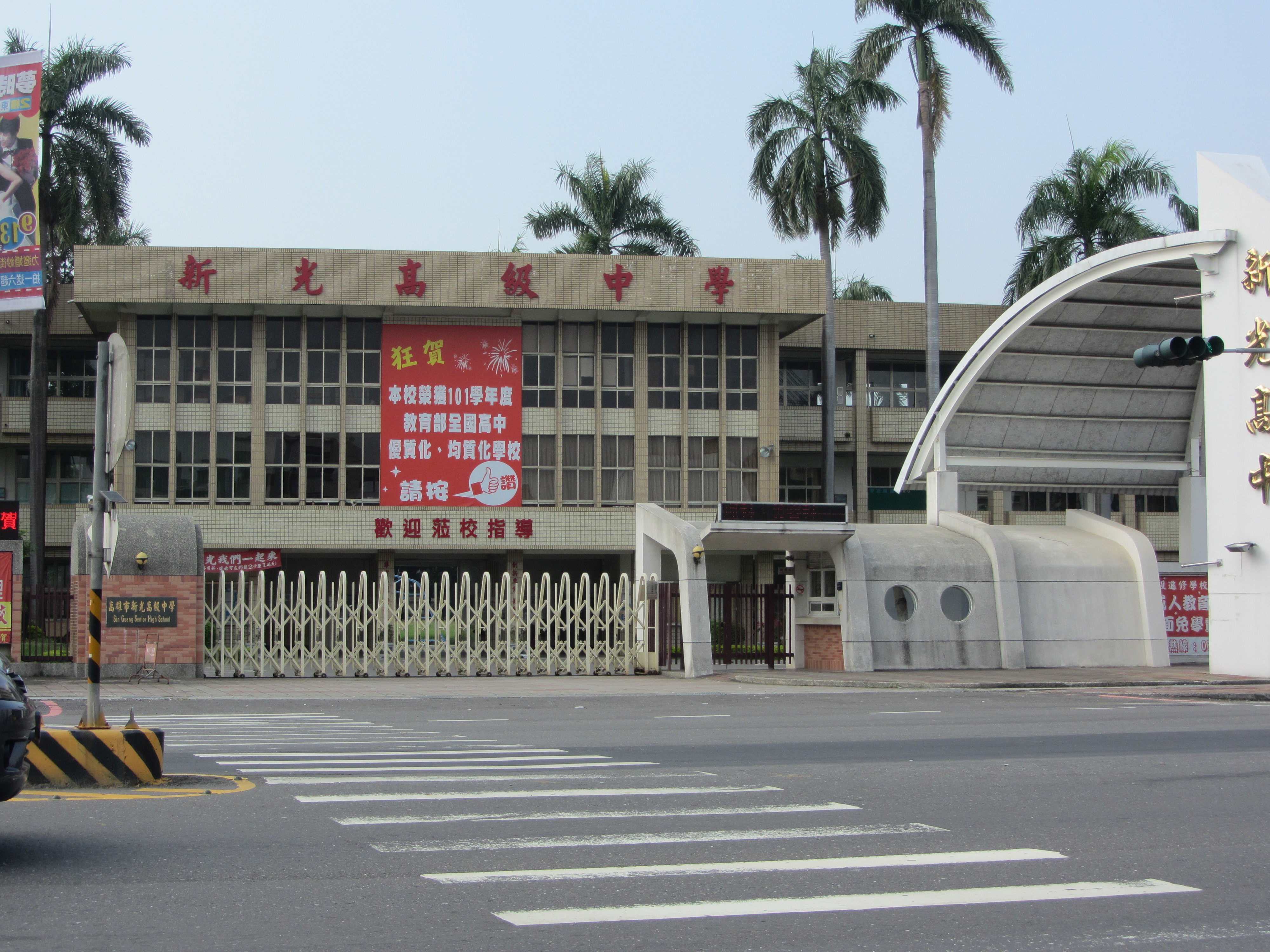 高雄市私立新光高級中學校門